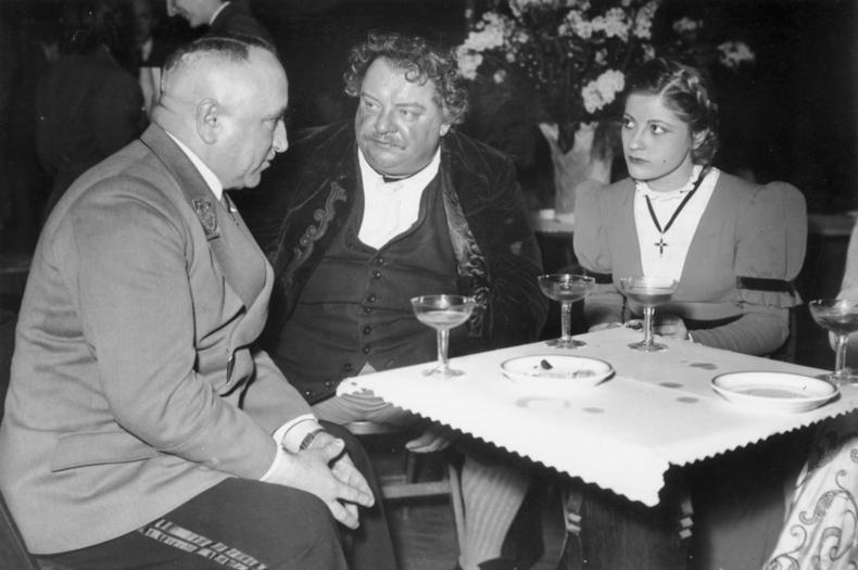 ADN-ZB Gastspiel des Berliner Schiller-Theaters im besetzten Frankreich In dem von deutschen Faschisten besetzten Paris gab das Berliner Schiller-Theater im Januar/Februar 1941, im Theatre des Champs Elysees u.a. ein Gastspiel mit Schillers "Kabale und Liebe". UBz.: Nach einer Aufführung im Gespräch v.l.n.r.: der NS - Reichsorganisationsleiter Dr. Ley, Schiller-Theater-Intendant Heinrich George und Schauspielerin Gisela Uhlen. 2655-41